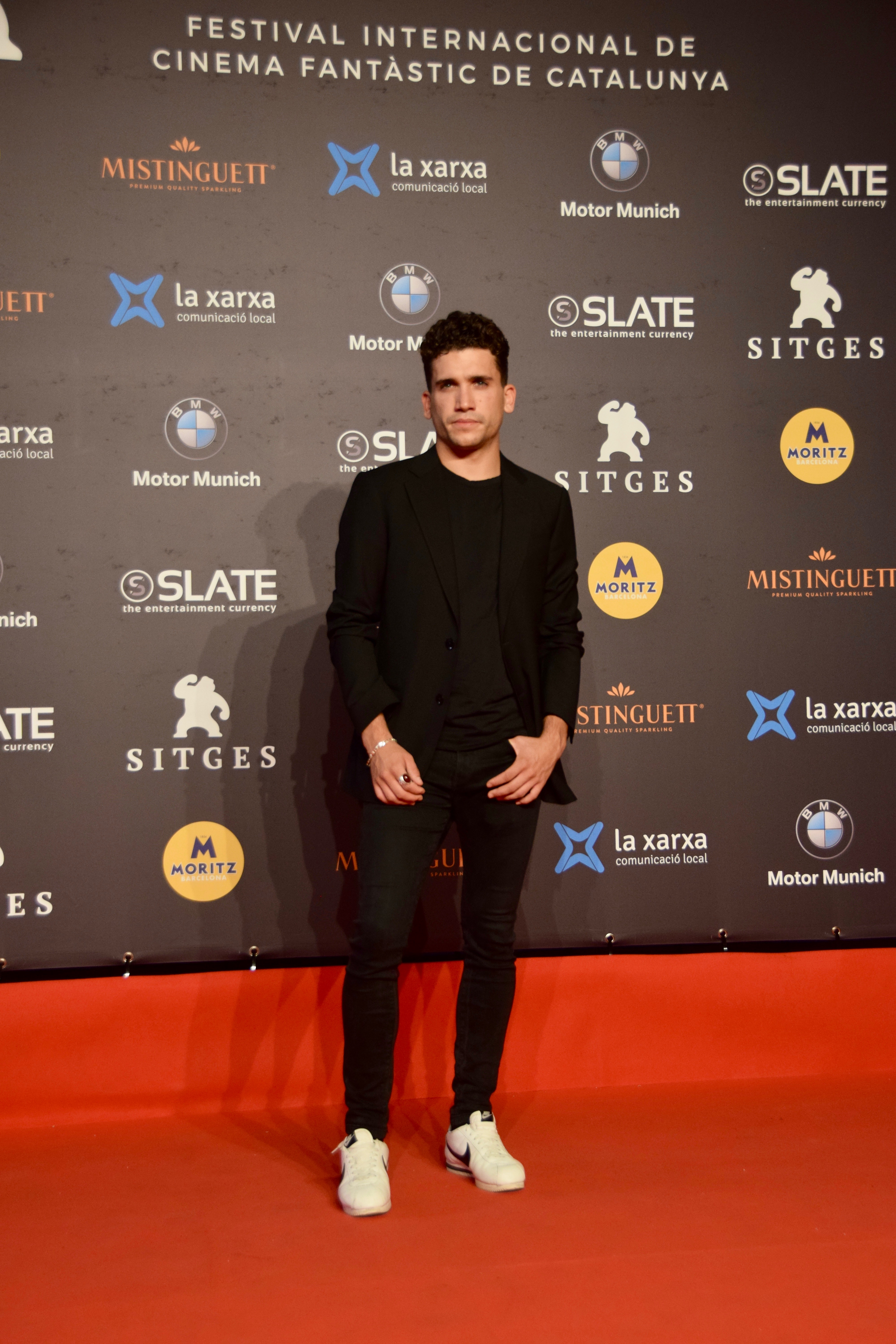 Festival de cinema de Sitges 2018